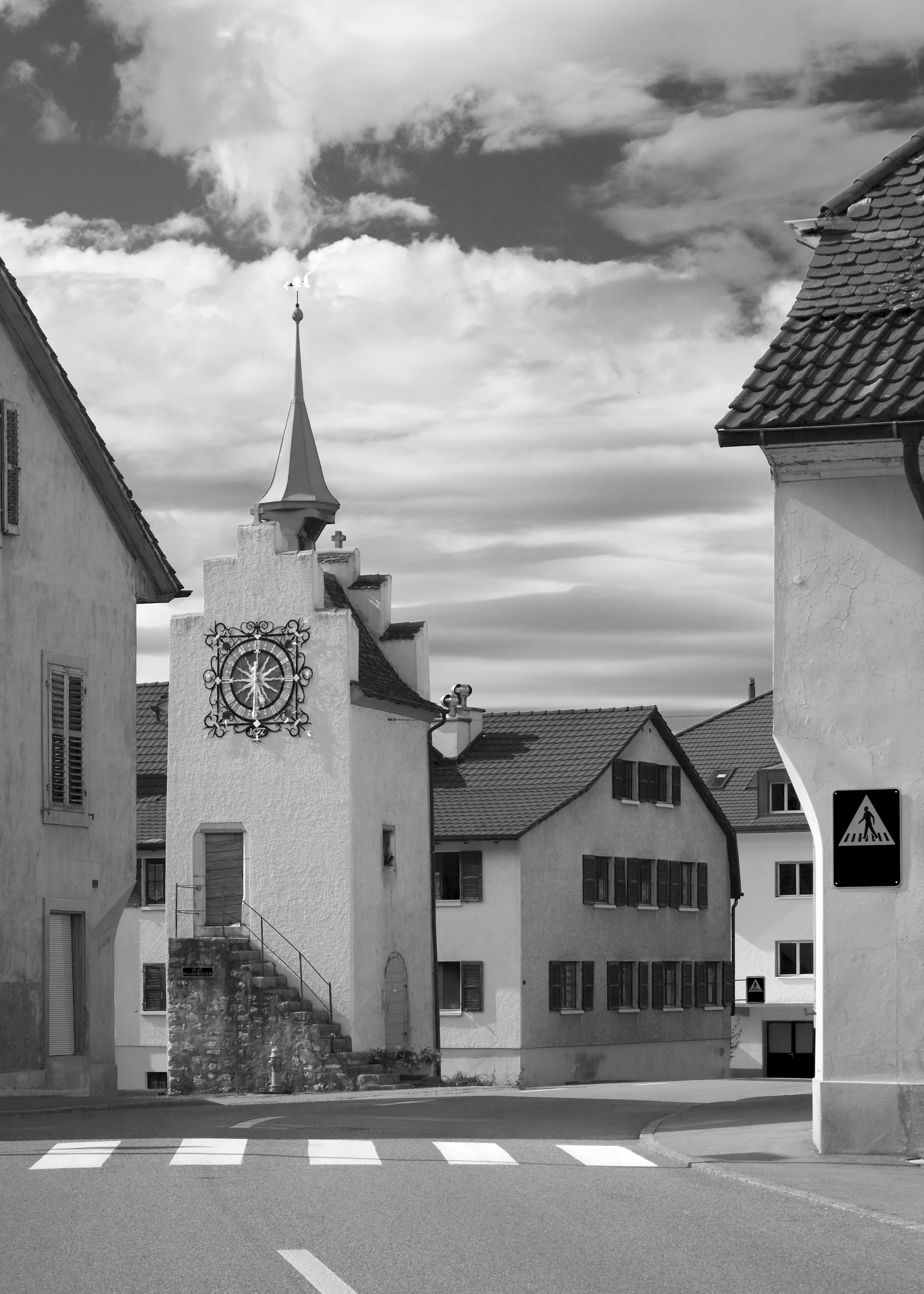 Das Dorfzentrum von Courrendlin, Schweiz mit dem alten Turm